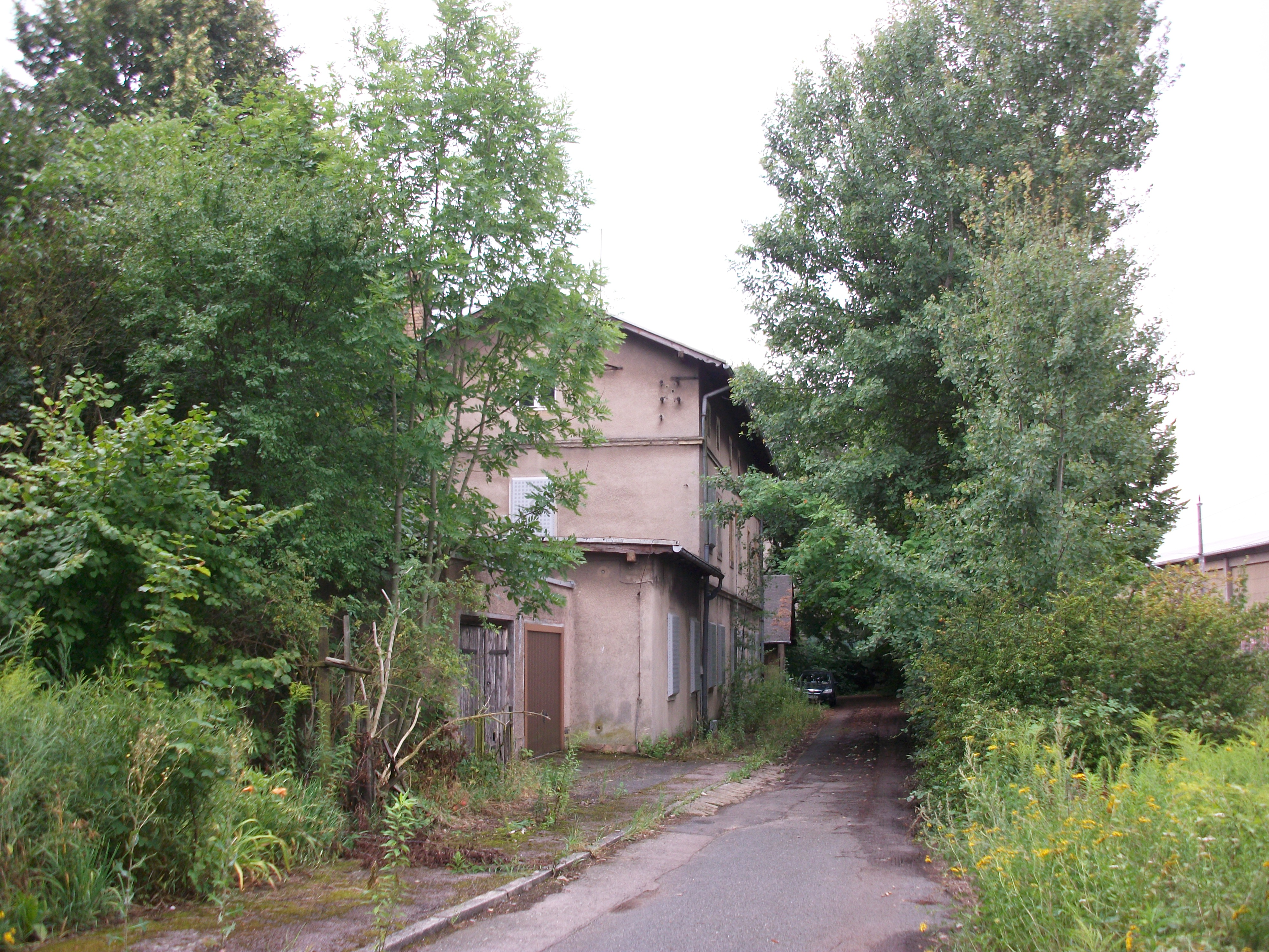 Ehemaliger Bahnhof Döbeln Nord, Empfangsgebäude (2017)